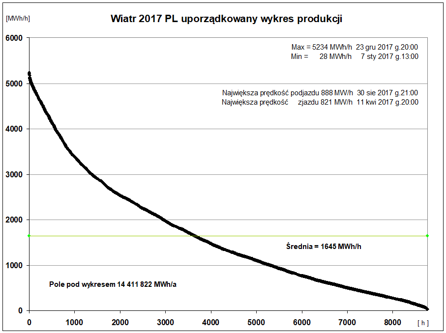 Roczny uporządkowany wykres produkcji wiatraków w Polsce za 2017